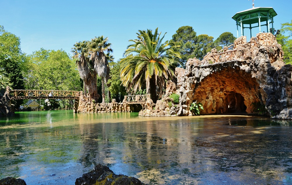 Parc Samà (Cambrils)